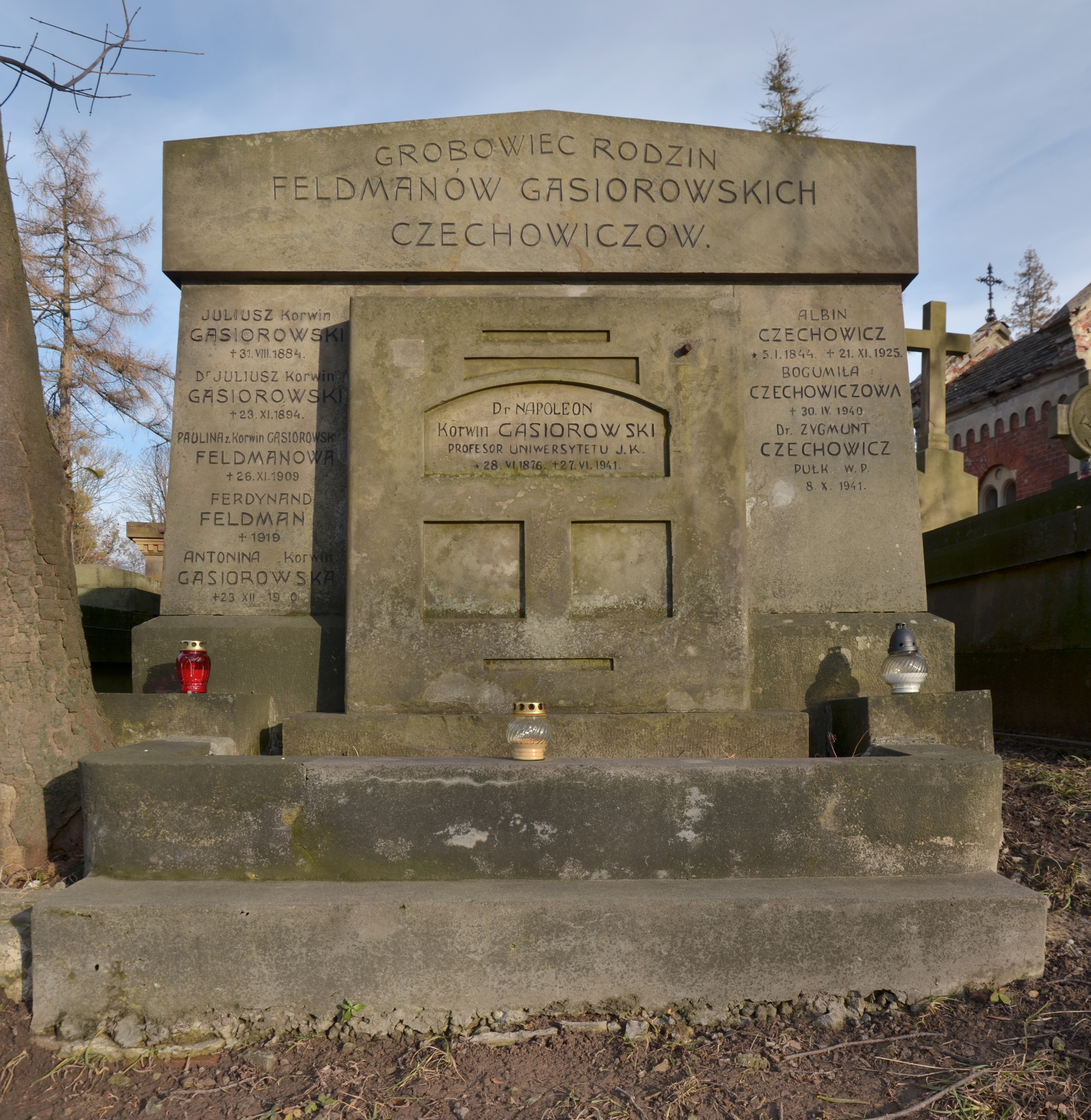 Гробівець Фельдманів, Гонсьоровських і Чеховичів на Личаківському цвинтарі у Львові.